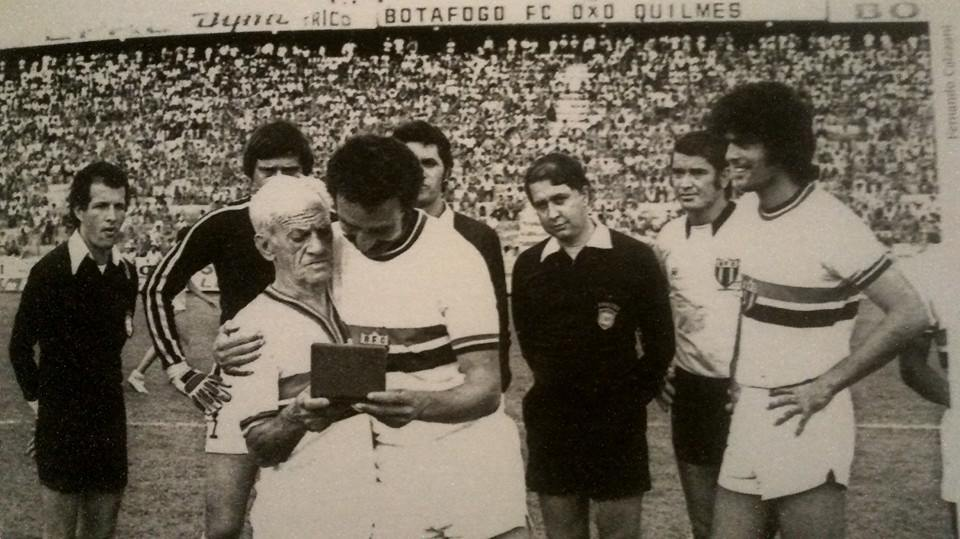 "Carrapato" sendo homenageado.